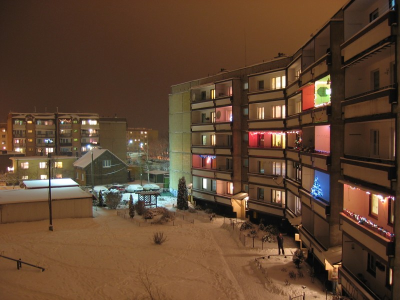 Ruda Śląska - widok na osiedle Halemba II.